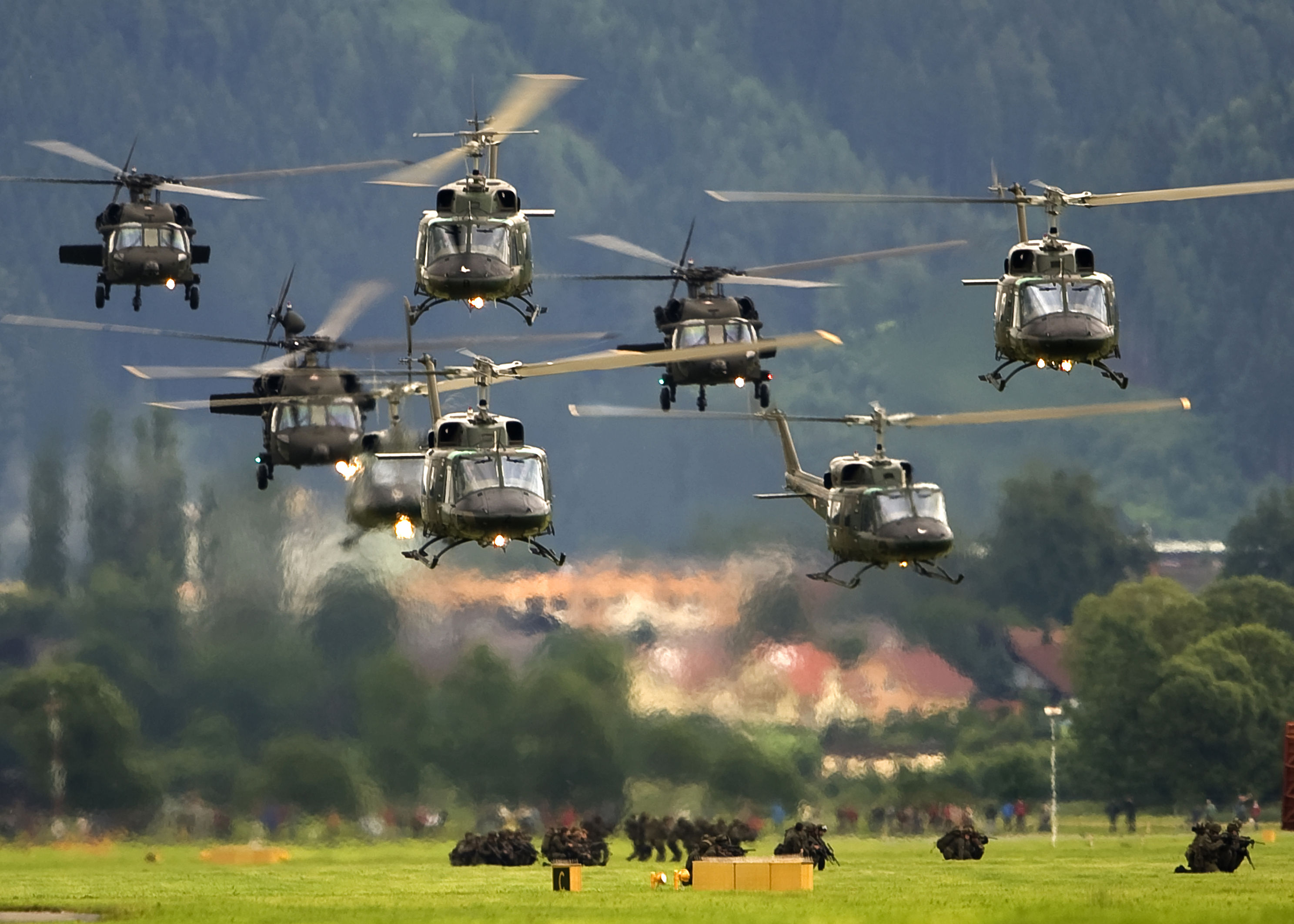 Bundesheer-Hubschrauber verlassen die Absetzzone.